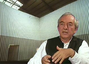 Portrait de Daniel Buren.